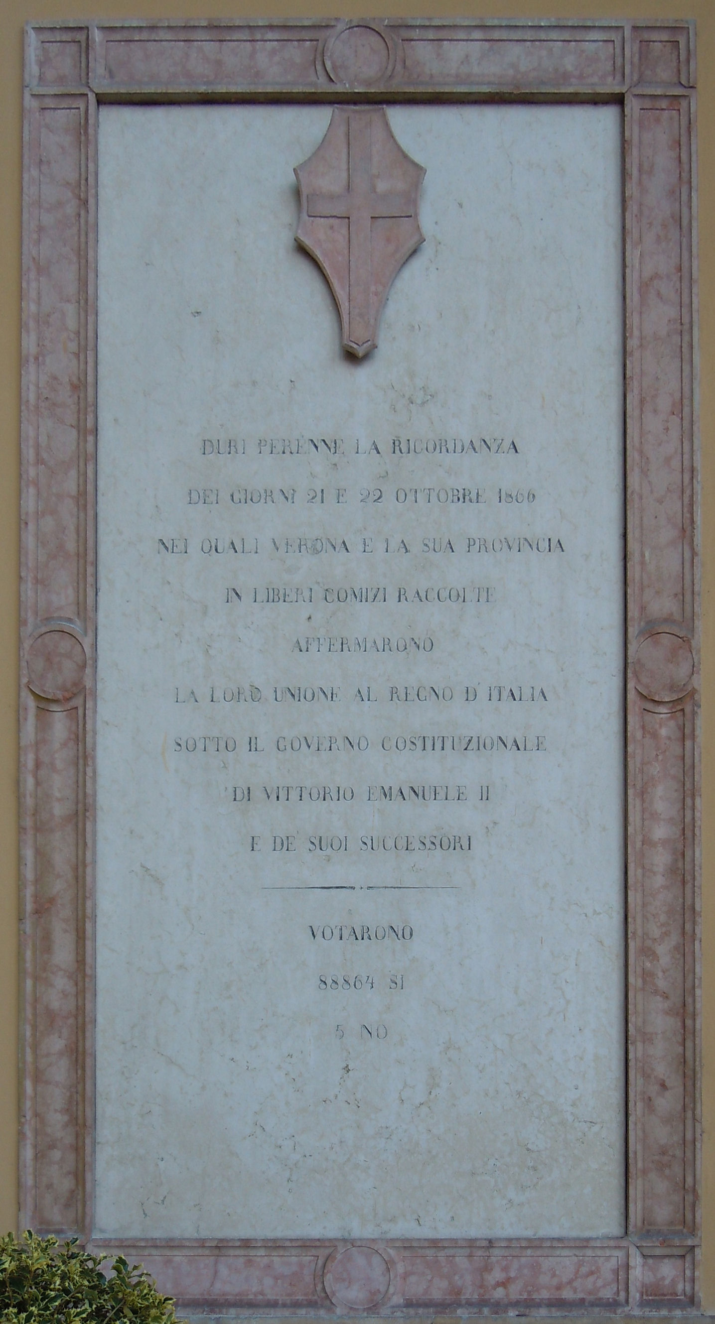 Lapide comnemorativa dei risultati del Plebiscito del Veneto del 1866 nella provincia di Verona, presso Palazzo Barbieri (municipio di Verona, piazza Brà) This is a photo of a monument which is part of cultural heritage of Italy. DURI PERENNE LA RICORDANZA DEI GIORNI 21 E 22 OTTOBRE 1866 NEI QUALI VERONA E LA SUA PROVINCIA IN LIBERI COMIZI RACCOLTE AFFERMARONO LA LORO RIUNIONE AL REGNO D'ITALIA SOTTO IL GOVERNO COSTITUZIONALE DI VITTORIO EMANUELE II E DEI SUOI SUCCESSORI ______.______ VOTARONO 88864 SI 5 NO